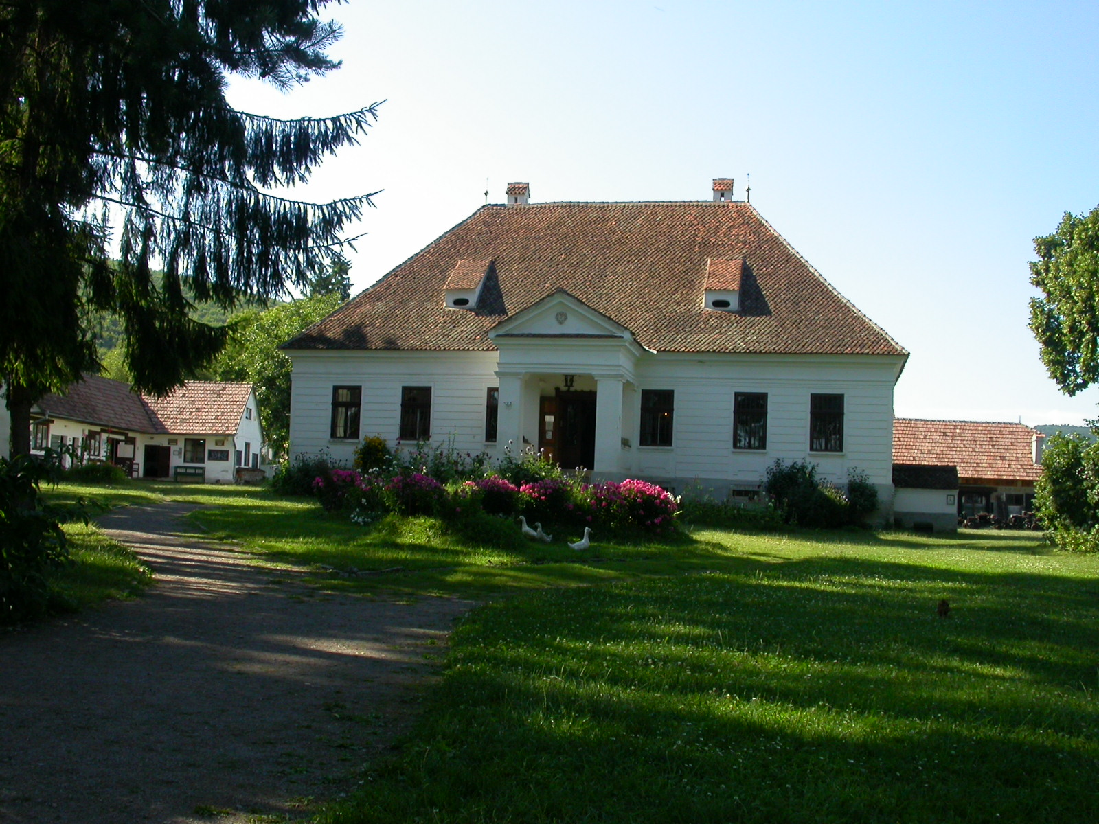 Ansamblul fostului conac Domokos Gyula, azi Muzeul etnografic în aer liber "Haszmann Pal" sec. XVII, ref. 1831